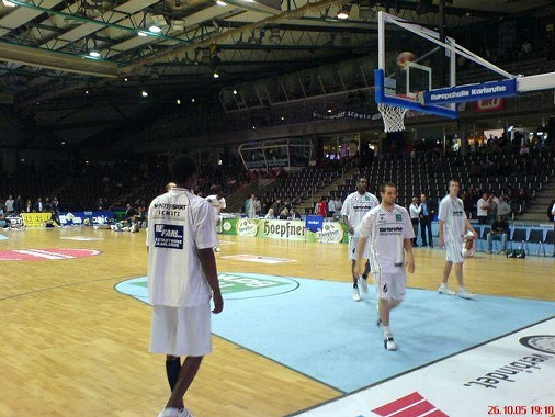 Innenansicht der Europahalle vor einem Spiel der BG Karlsruhe (2005/06)